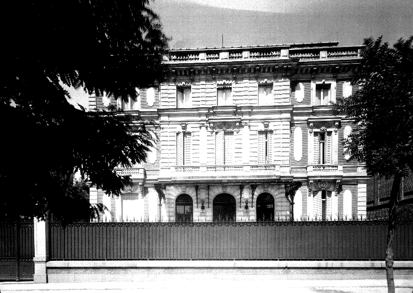 Palacio del Duque de Arión